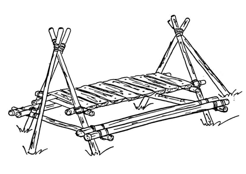 Table tripode fabrication de froissartage (scoutisme)